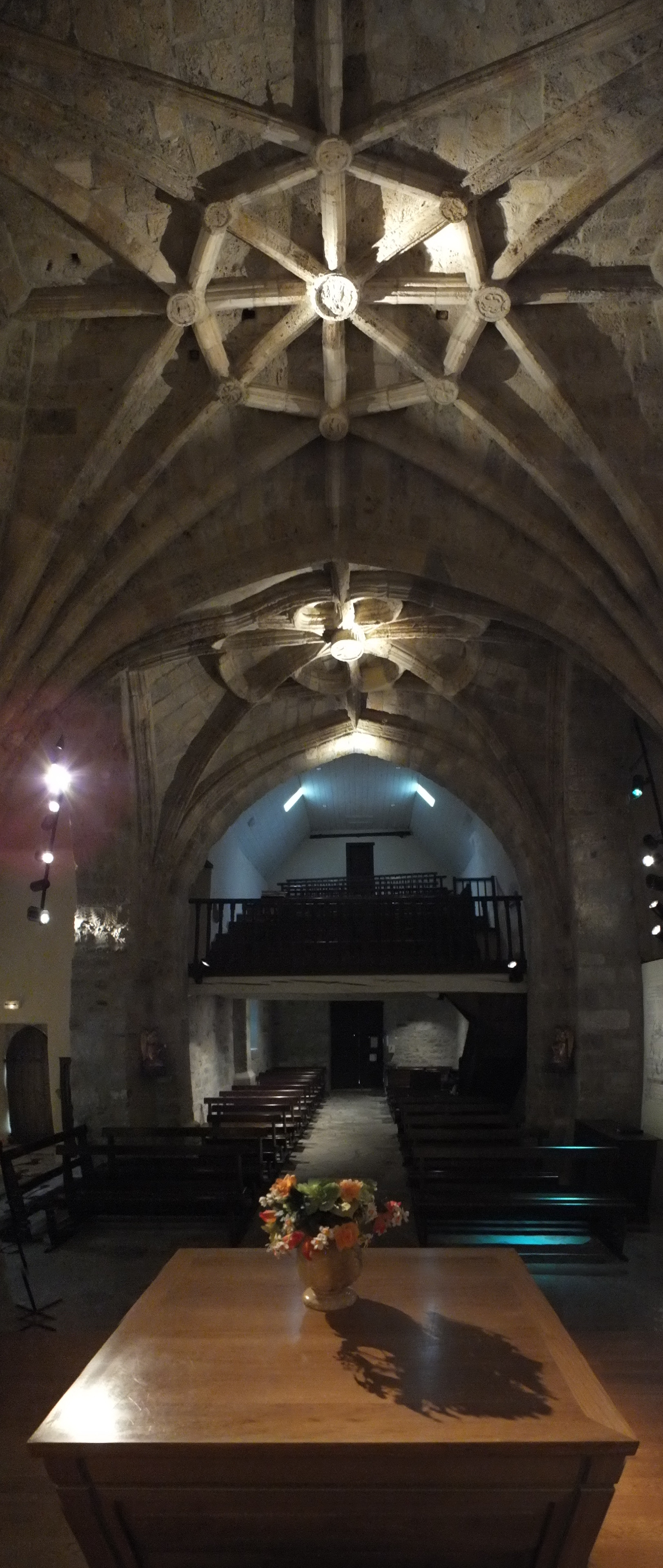 Église Saint-Jean-Baptiste de Larrau (64). Panoramique vertical depuis le chœur. .